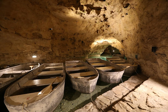 Tapolca, Tavasbarlang